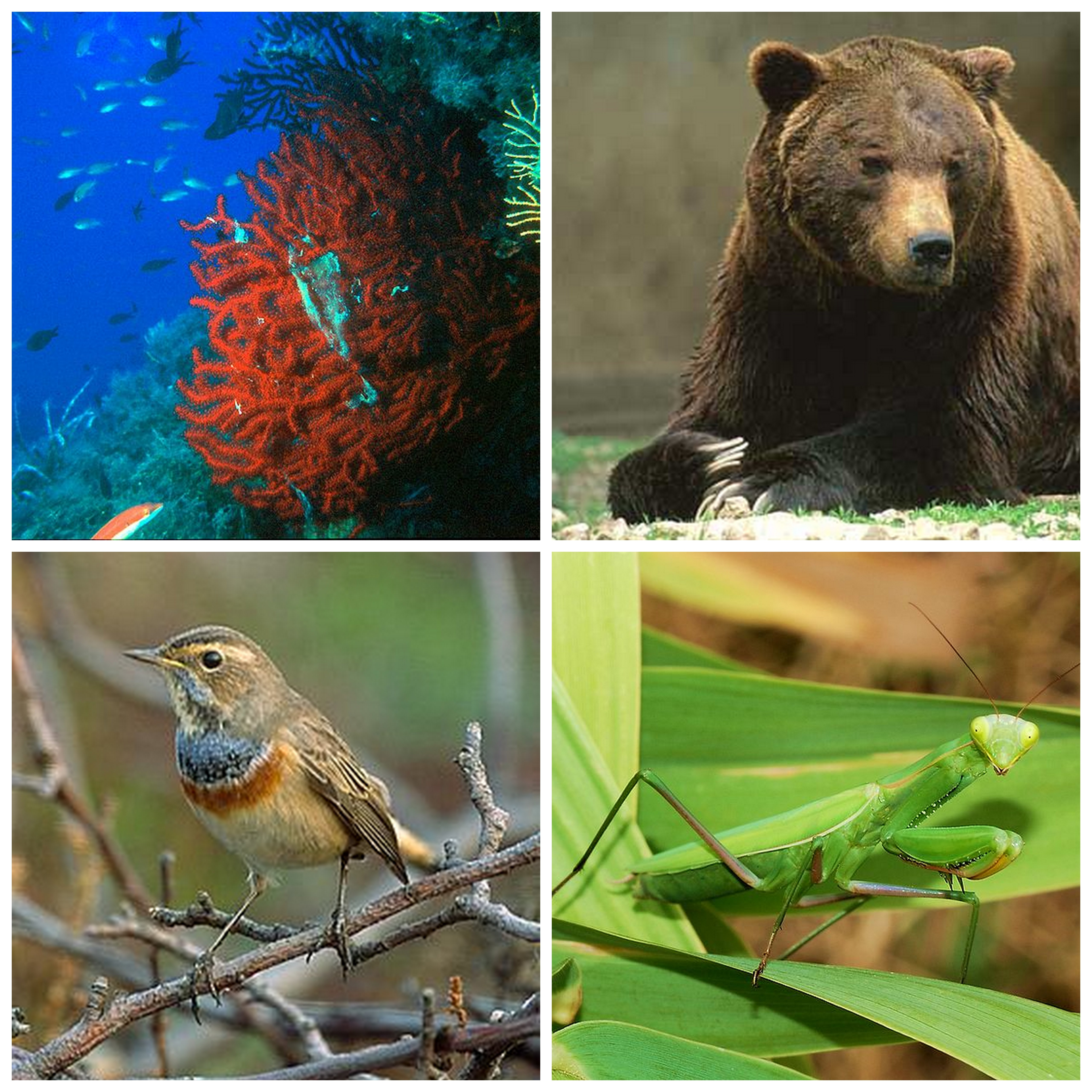 Collage di quattro foto sulla fauna italiana.